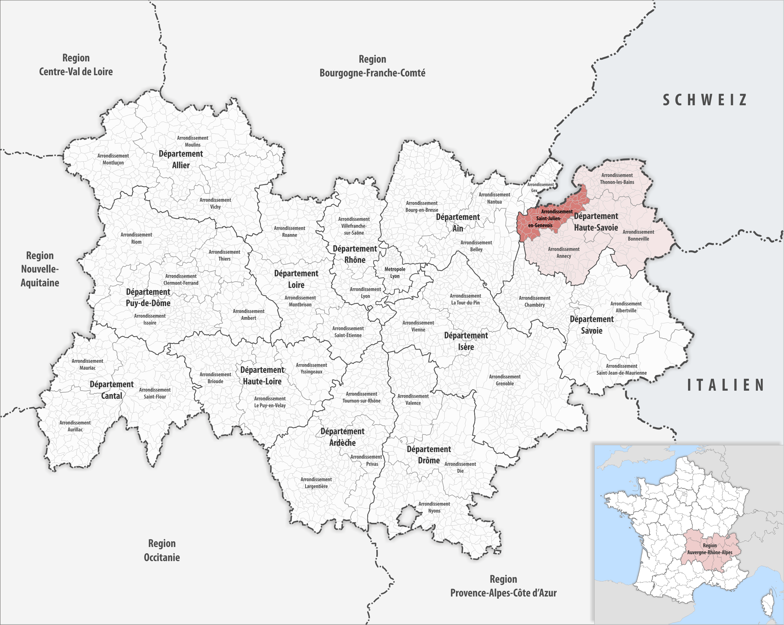 Lage des Arrondissements Saint-Julien-en-Genevois